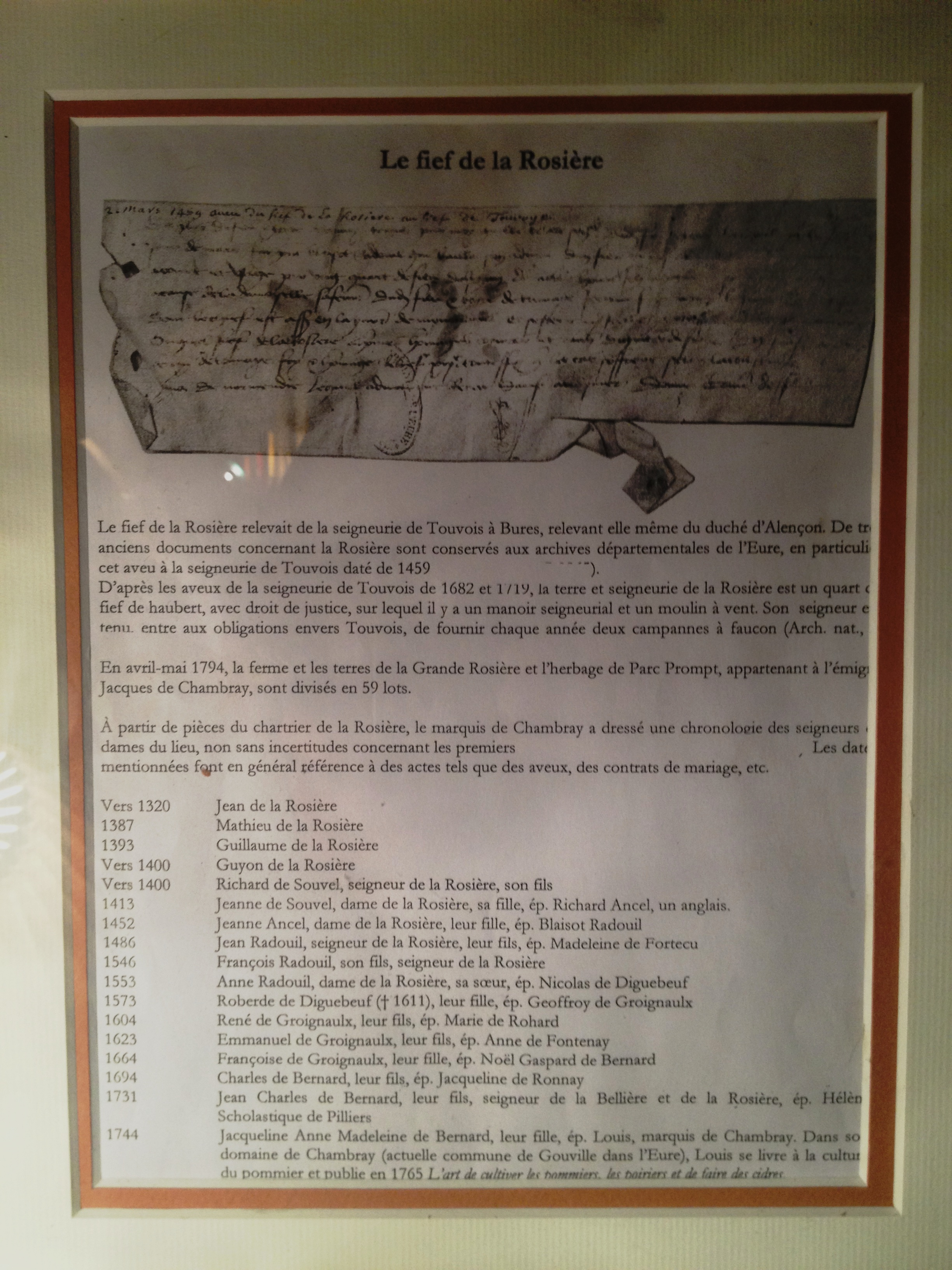 historique des occupants de La GRANDE ROSIERE